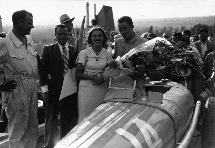 Grand Prix du Comminges 1936, victoire de JP Wimille sur Bugatti T59.